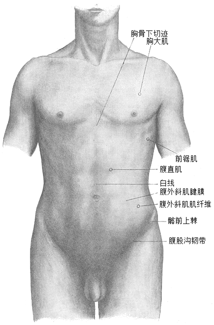 腹部前表面